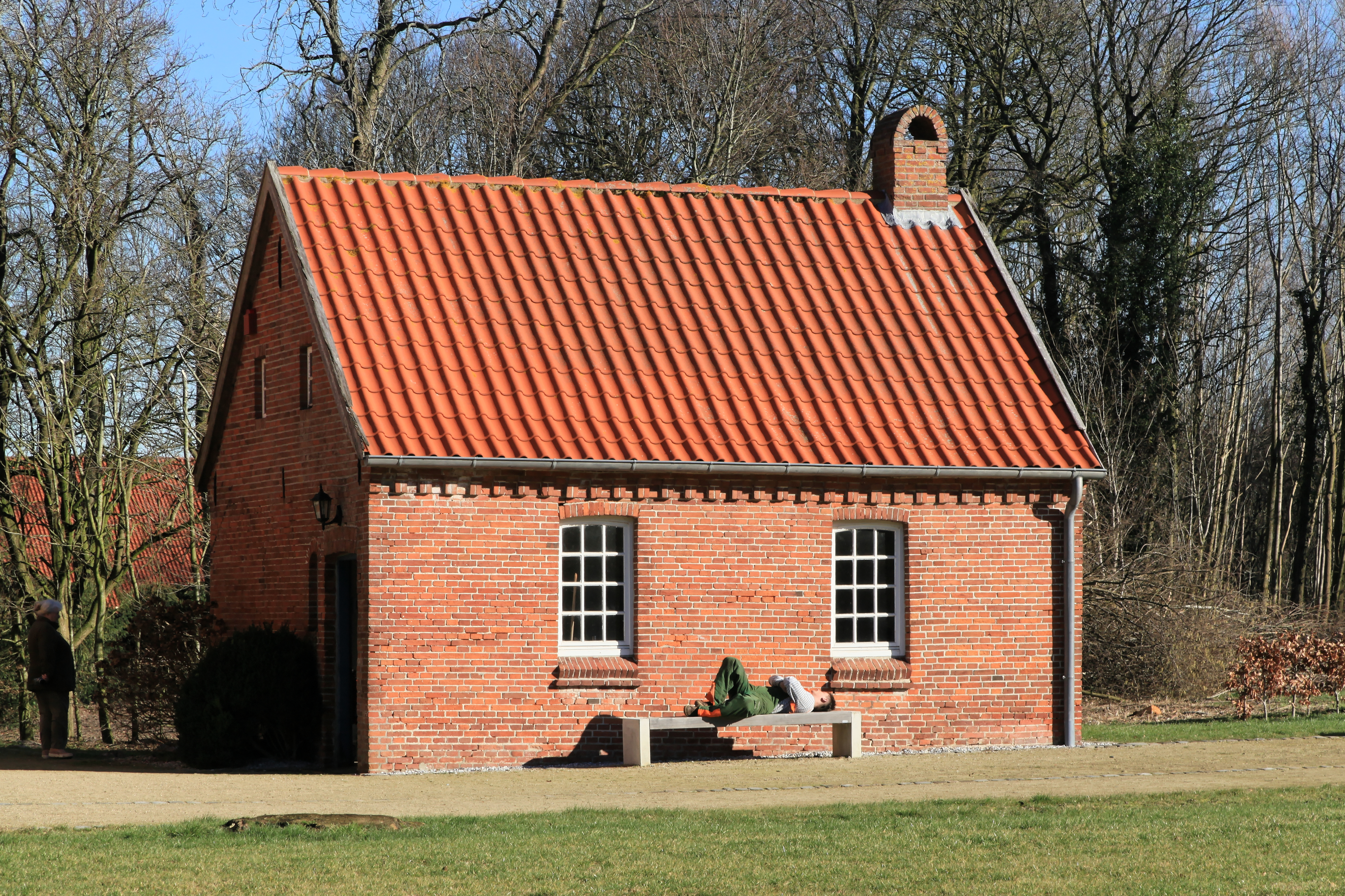 Kochhaus von Steinhaus Bunderhee, Steinhausstraße 64 in Bunde (Germany)